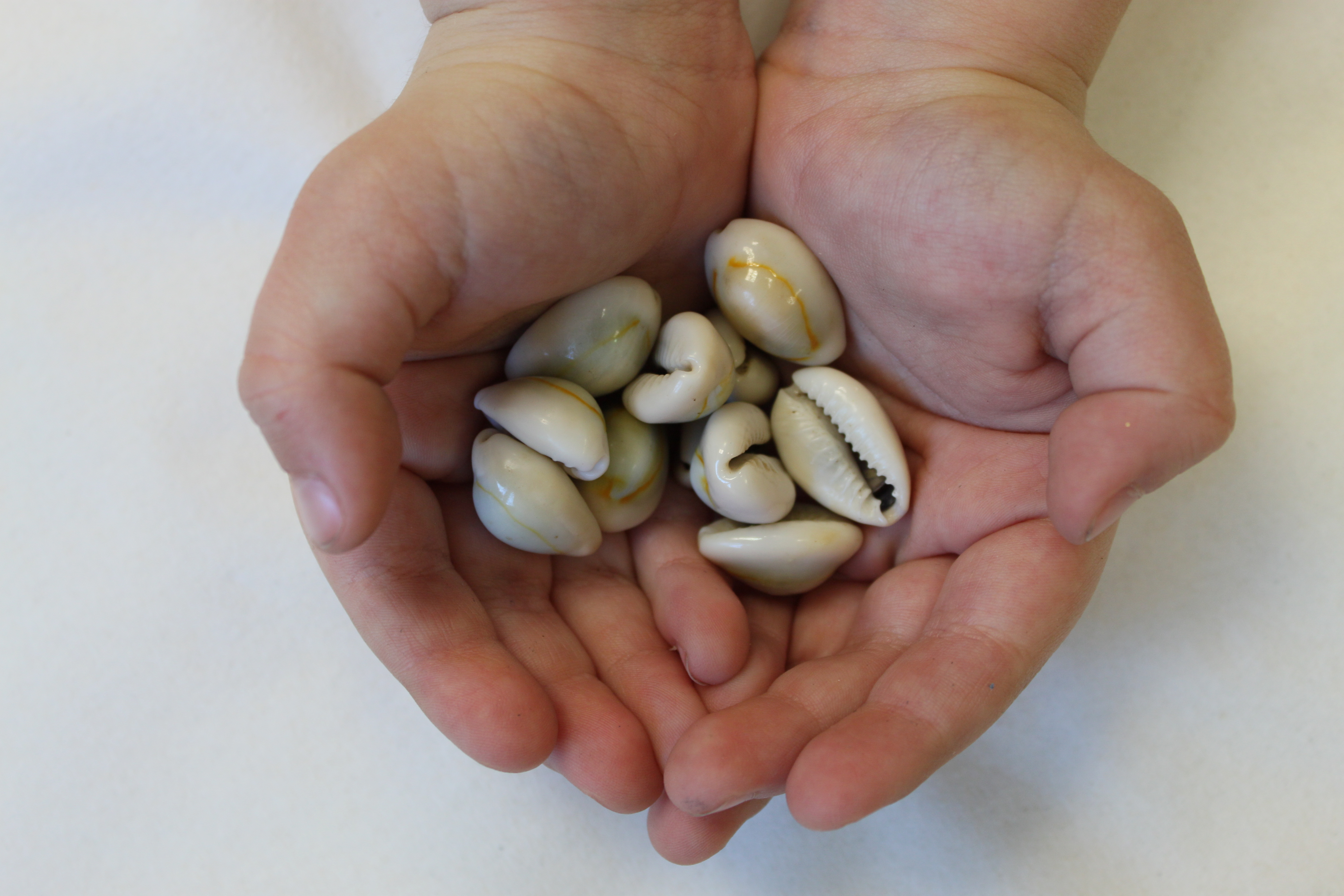 Gehäuse der Monetaria annulus (Ringkauri)), wure als Kaurigeld verwendet; Kinderhände - 3 Jahre alt